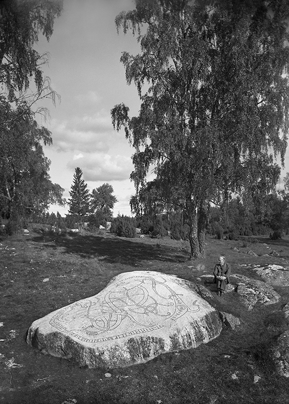 RAÄ-nummer Orkesta 44:1. Inskriften på runhällen är den till ytan största i Uppland. Inskriften lyder: Häming och Själve och Johan de låter hugga efter sin fader Finnvid, och Vargas och Ragnfrid, och [efter] sin moder, och efter Ingegärd och efter Kalv och Gärdar och ... Han ägde ensam allt först. Det var deras fränder. Gud hjälpe deras ande. Visäte ristade dessa runor. Motiv: U337 Granby, Orkesta Nyckelord: Runor Kategori: Runristning/runsten RAÄ-nummer Orkesta 44:1. Inskriften på runhällen är den till ytan största i Uppland. Inskriften lyder: Häming och Själve och Johan de låter hugga efter sin fader Finnvid, och Vargas och Ragnfrid, och [efter] sin moder, och efter Ingegärd och efter Kalv och Gärdar och ... Han ägde ensam allt först. Det var deras fränder. Gud hjälpe deras ande. Visäte ristade dessa runor. U337 Granby, Orkesta.